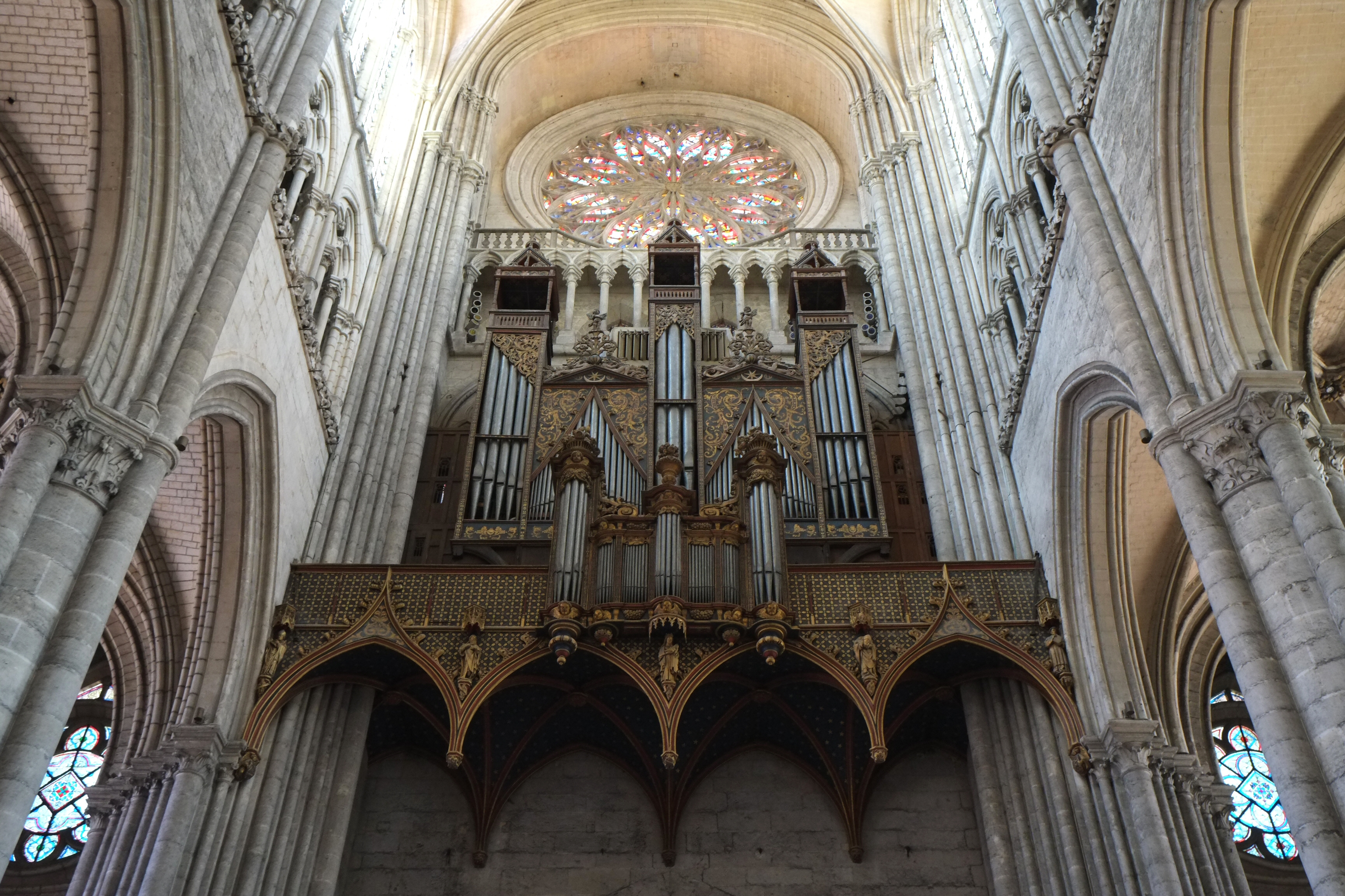 Grand orgue de la cathédrale Notre-Dame Amiens Somme France